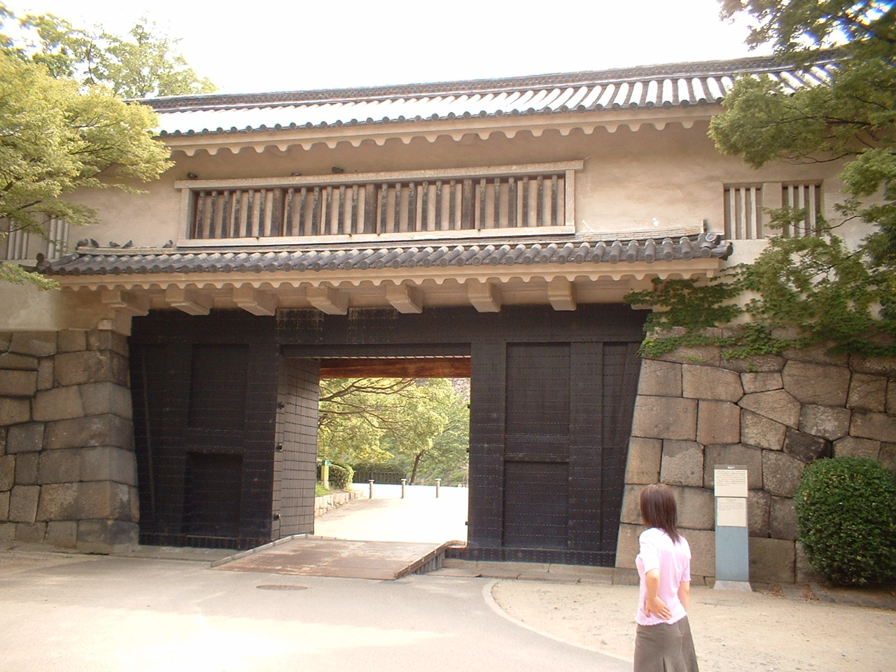 Aoya gate at Osaka Castle Public Park (大阪城公園の青屋門)